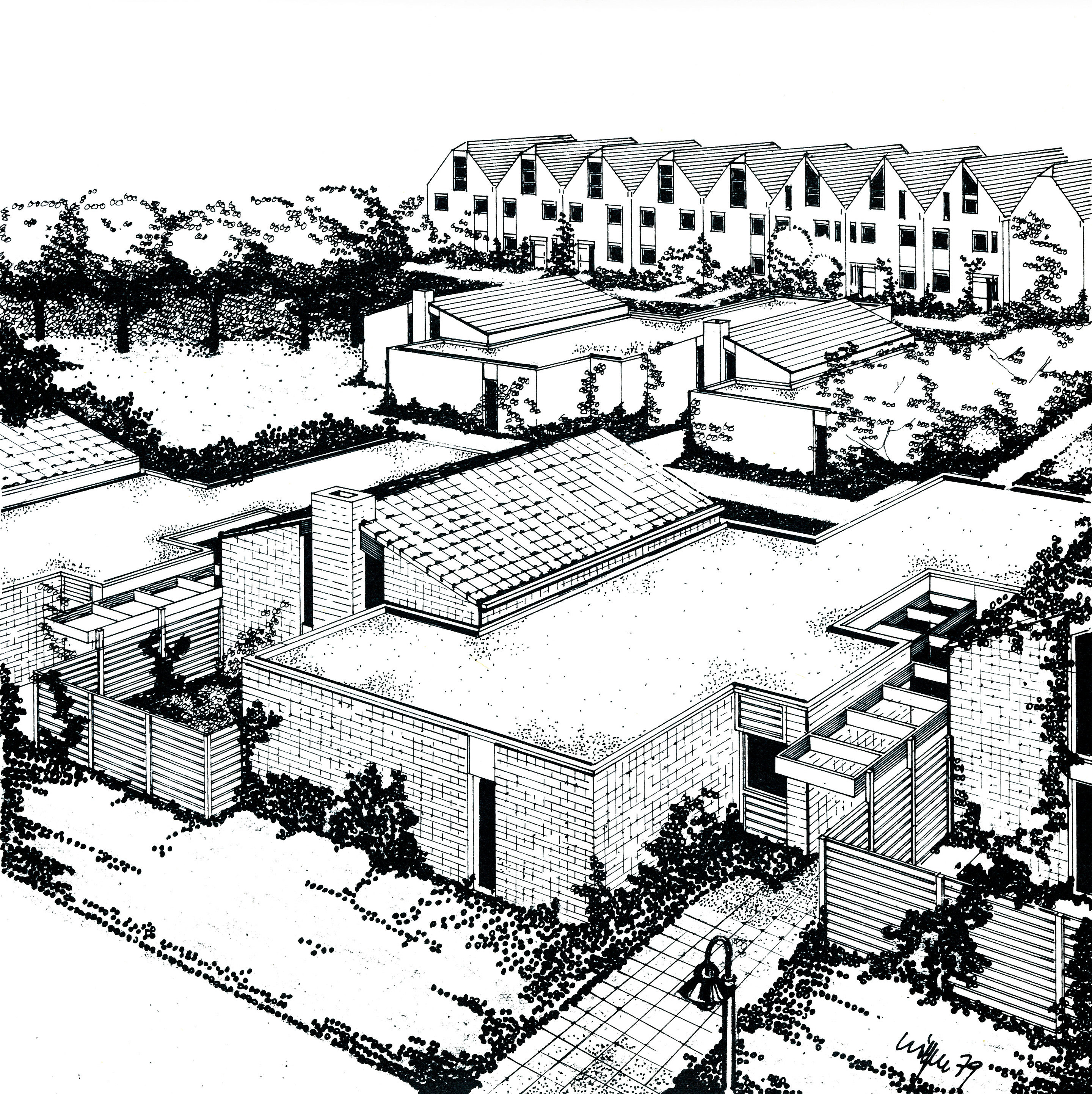 Siedlungsarchitektur, 1973